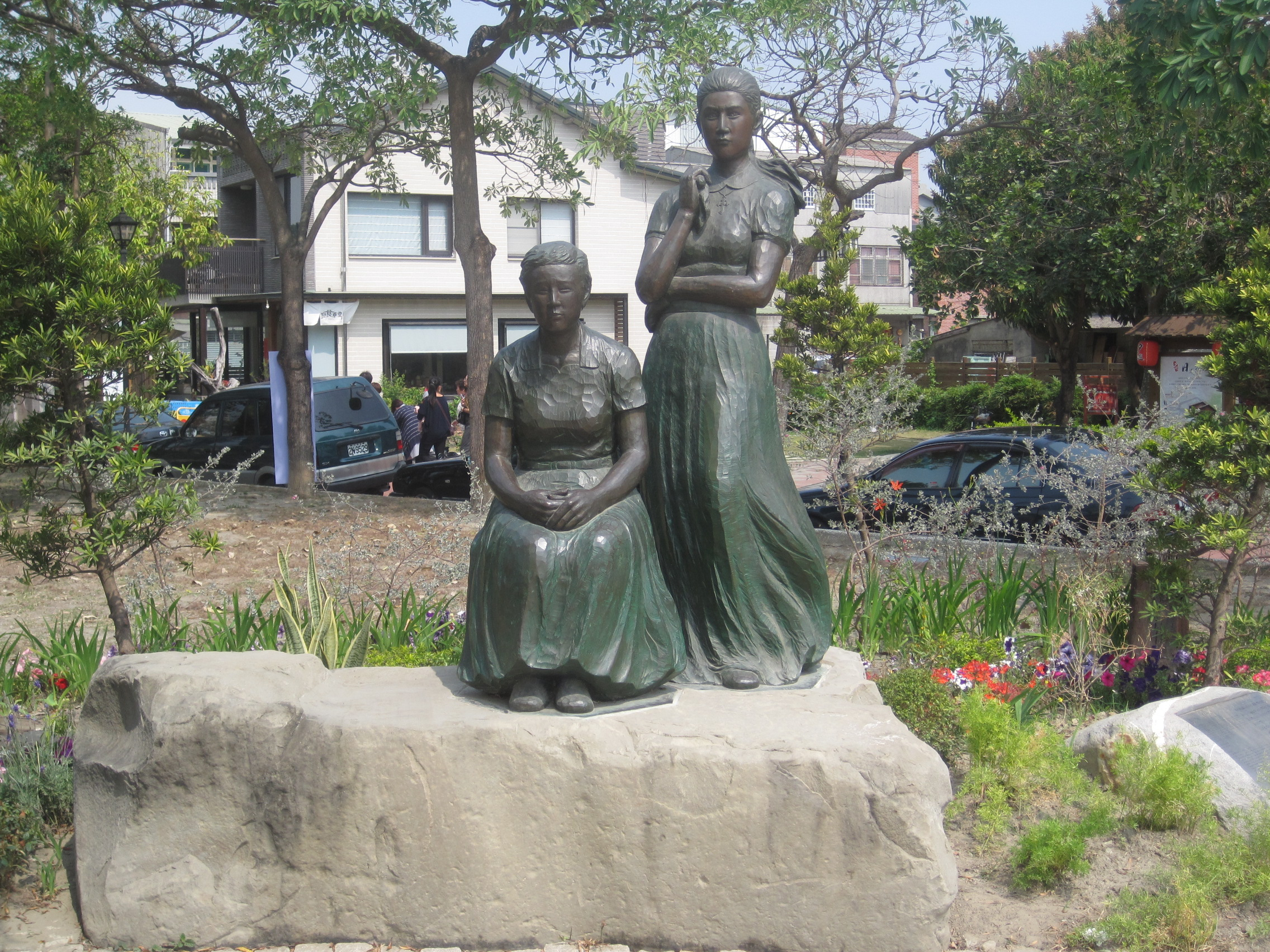 位於東興洋行前的安平金小姐銅像